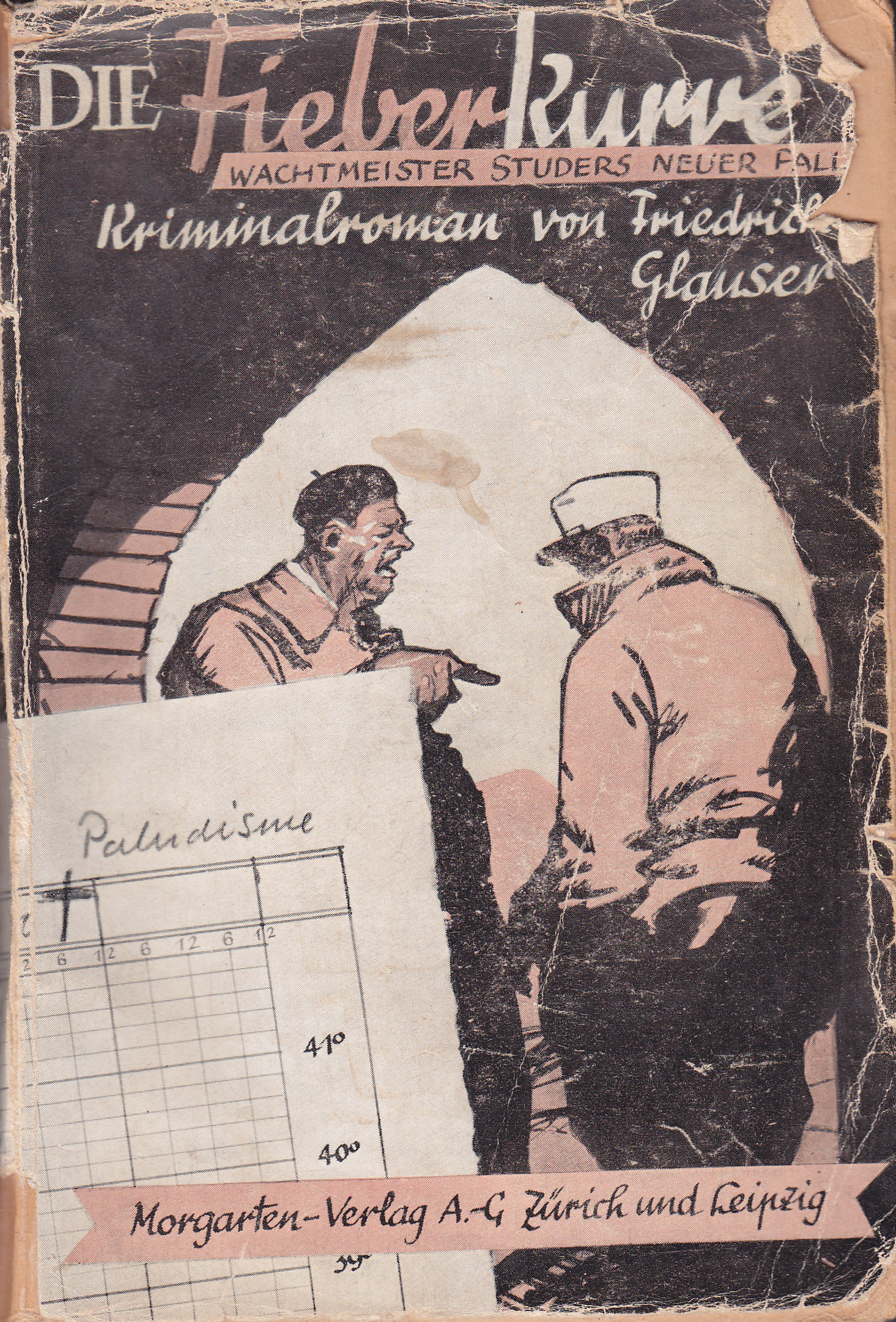 „Die Fieberkurve“ in der Buchausgabe des Morgarten-Verlags, Zürich 1938. Verlag wurde übernommen vom Oesch Verlag, Zürich. Umschlagentwurf: H. Schaad